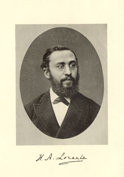 Hendrik Antoon Lorentz (1853 – 1928)